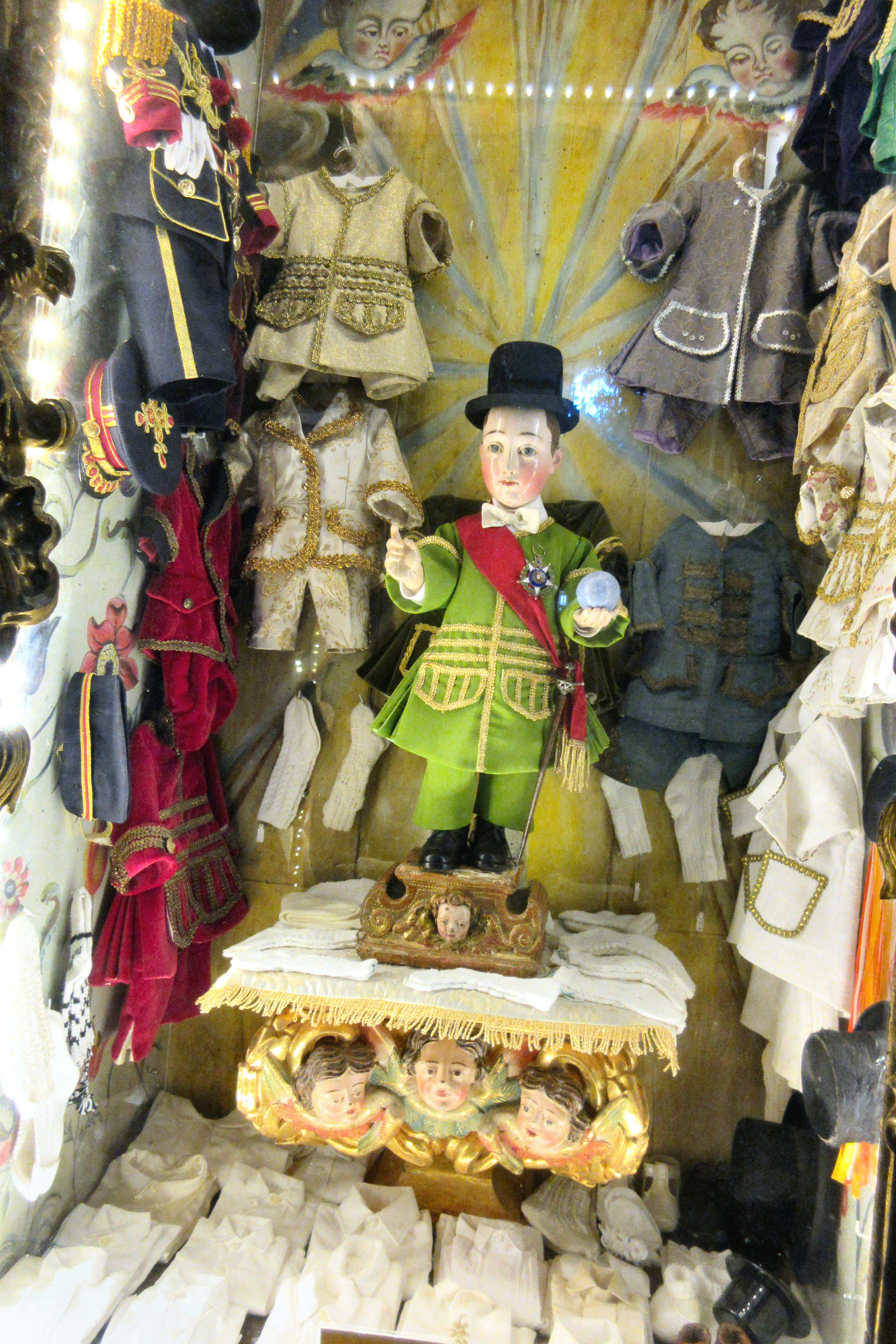 Menino da Cartolinha, imagen del Niño Jesús en la Catedral de Miranda do Douro.